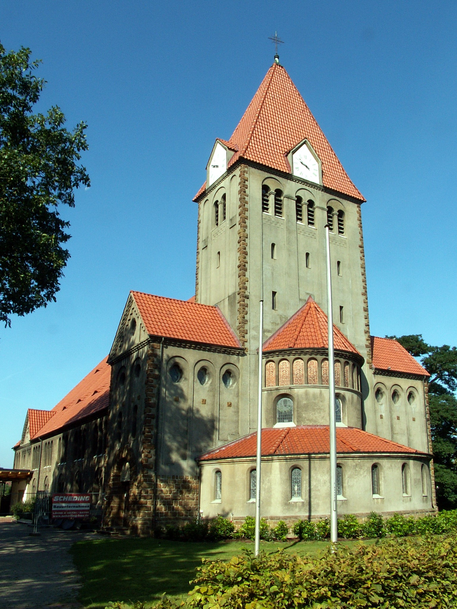 ev. Christuskirche in Löhne, Stadtteil Obernbeck, Ansicht von Südosten